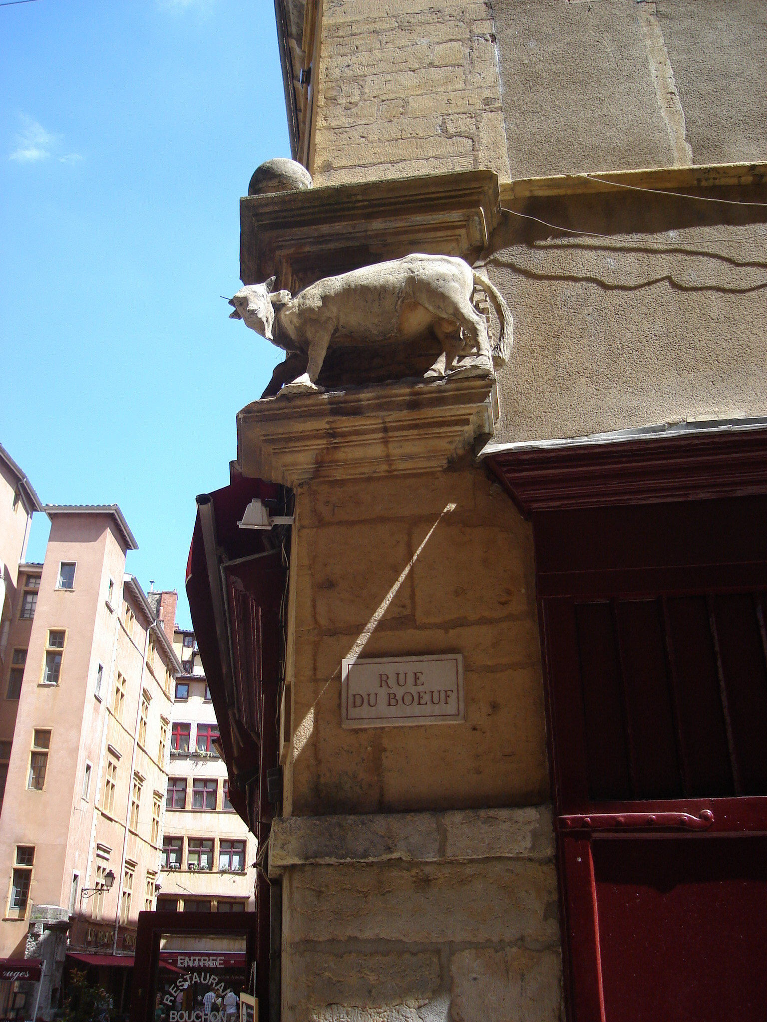 Rue du boeuf, Lyon